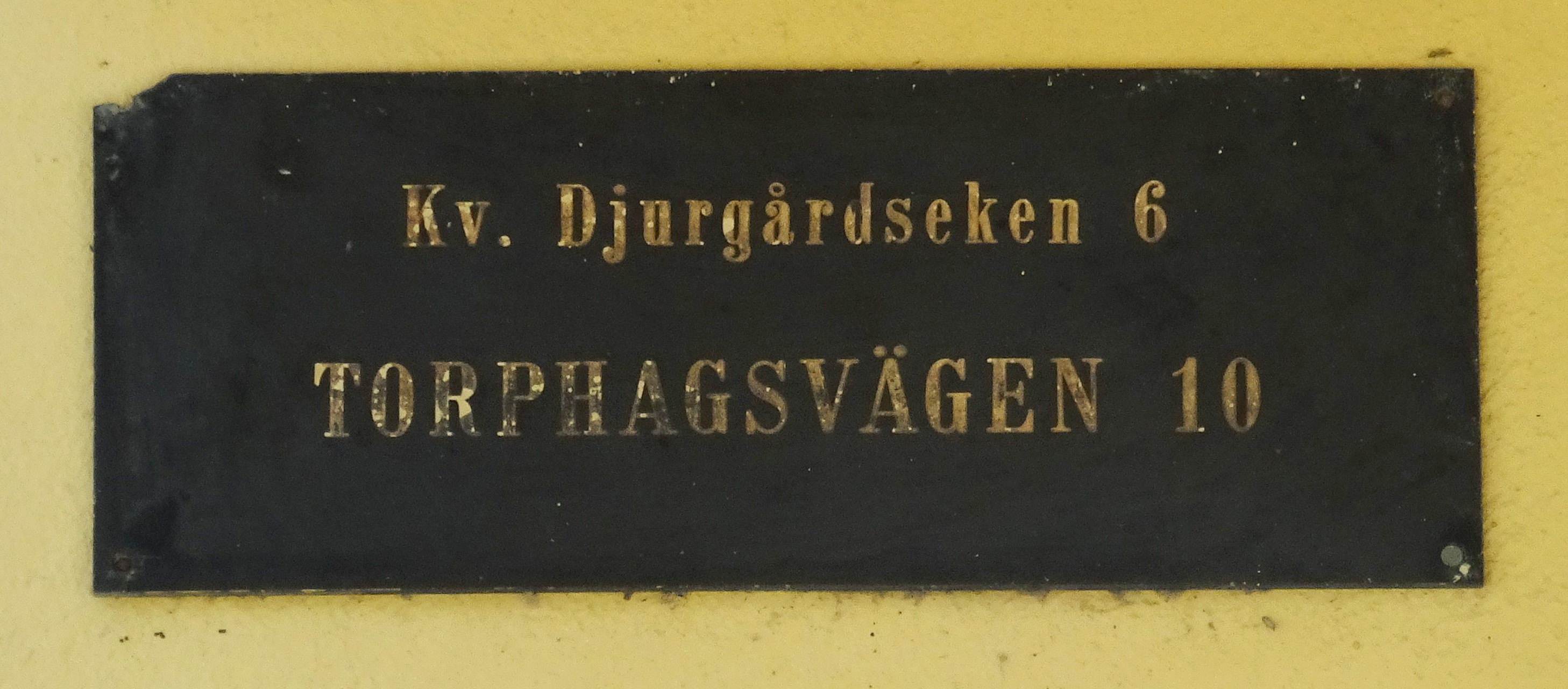 Torphagsvägen 10, Ekhagen